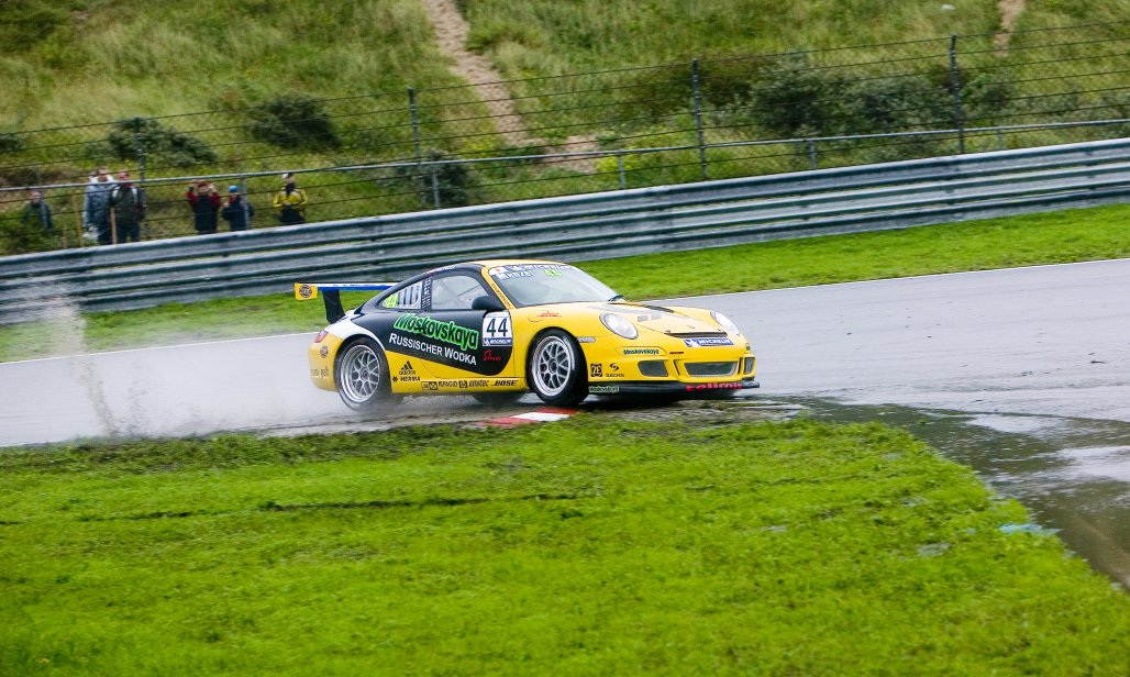 Christian Menzel beim Porsche Carrera Cup 2006